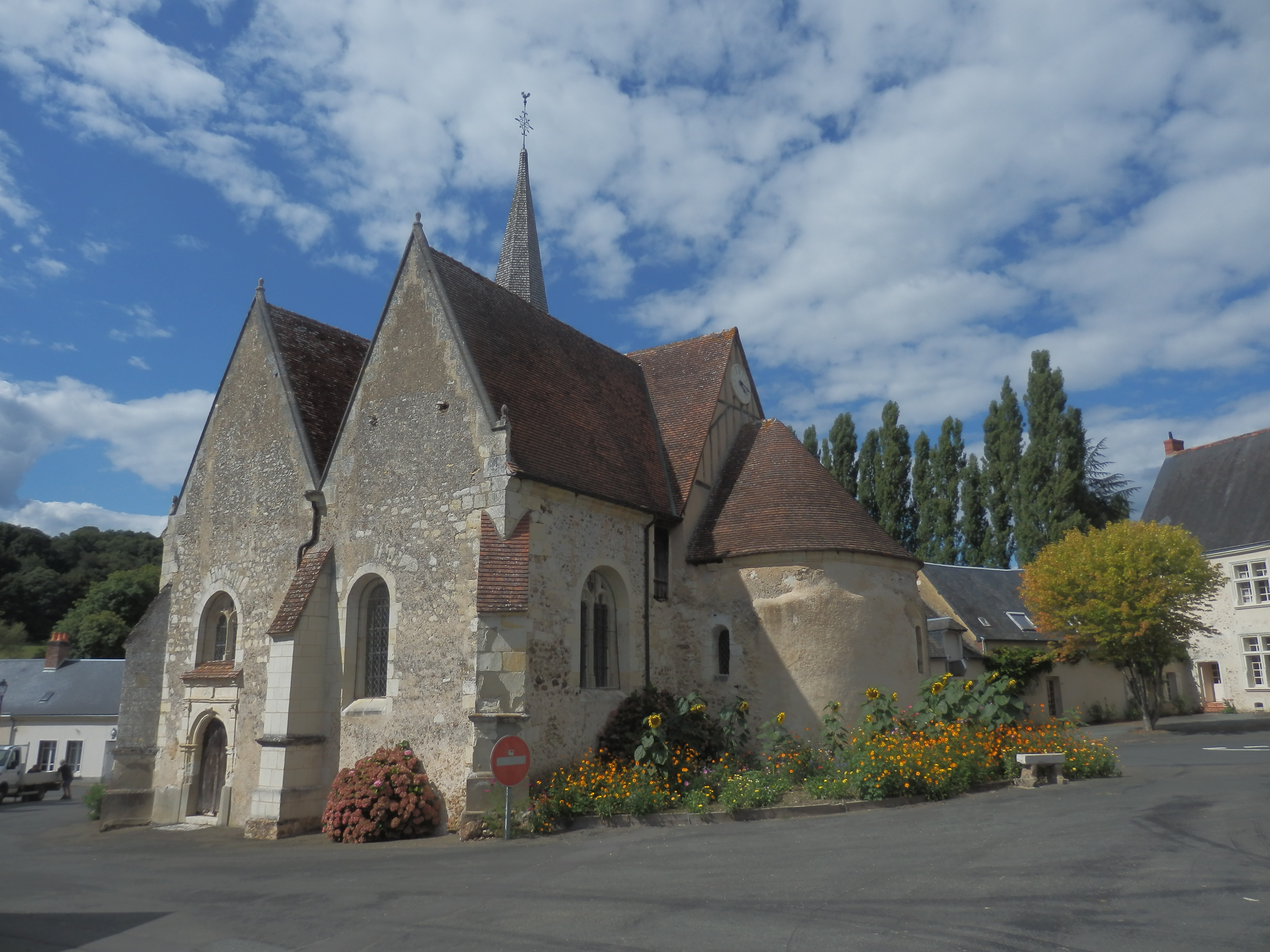 Vue de l'église depuis le sud.